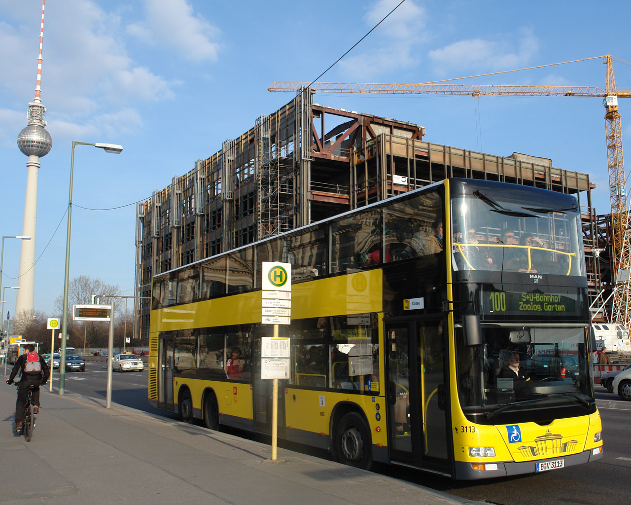 NEOMAN A39 double decker Bus in Berlin